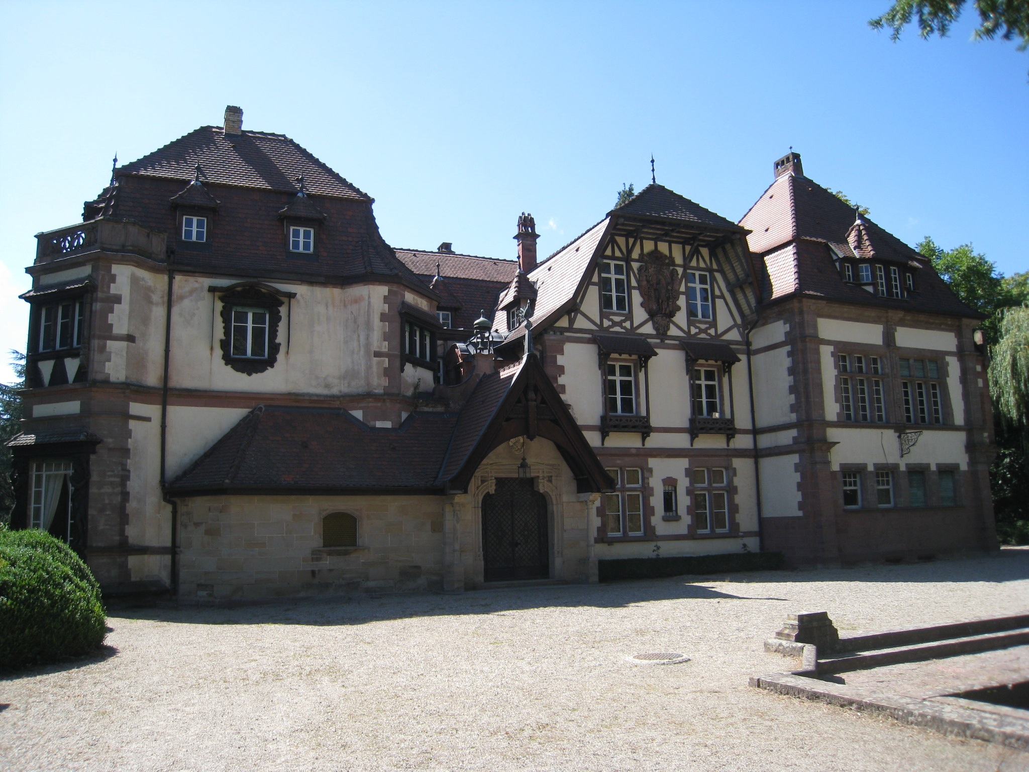 Château de la Léonardsauactuel musée du cheval et de l'attelage, Saint-Léonardsau (InscritInscrit, 19861990) .